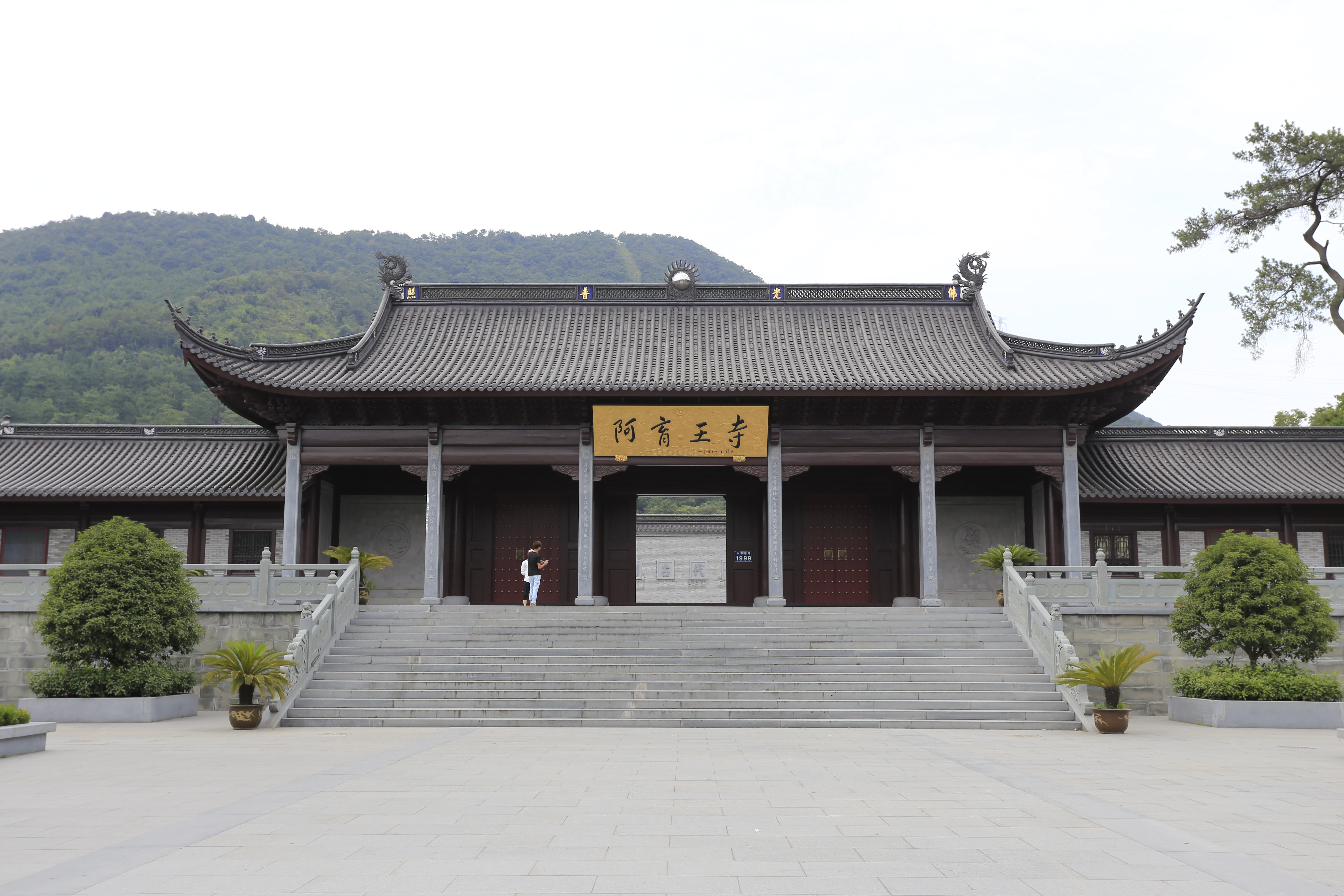 宁波阿育王寺 —— 新建的山门